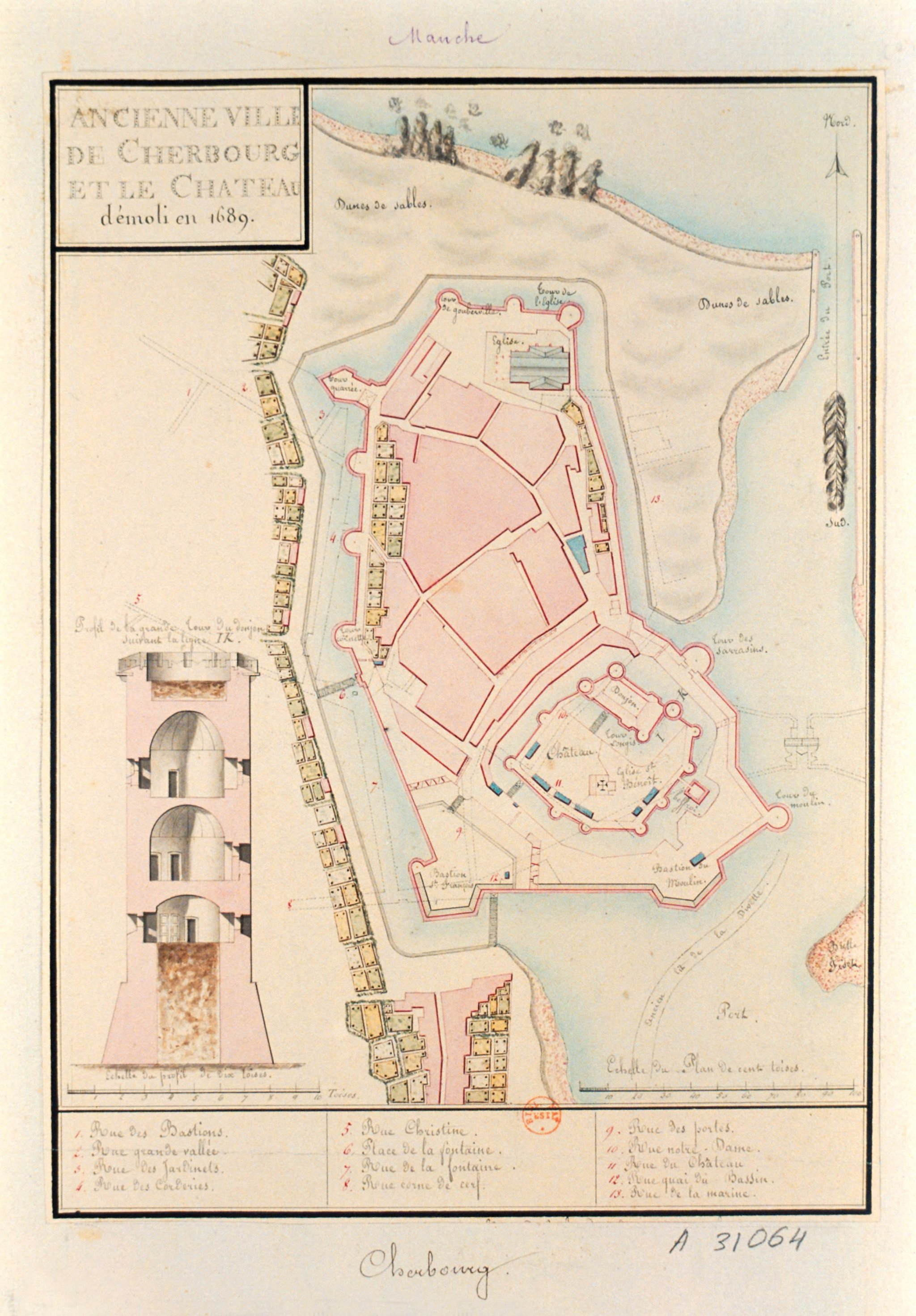 Carte du château de Cherbourg